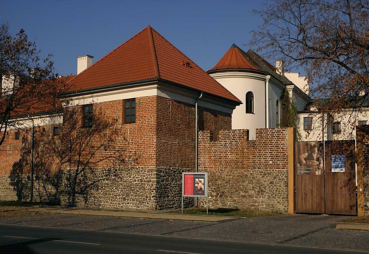 Fragment odrestaurowanych murów miejskich, w głębi budynek dawnego kolegium pijarów.